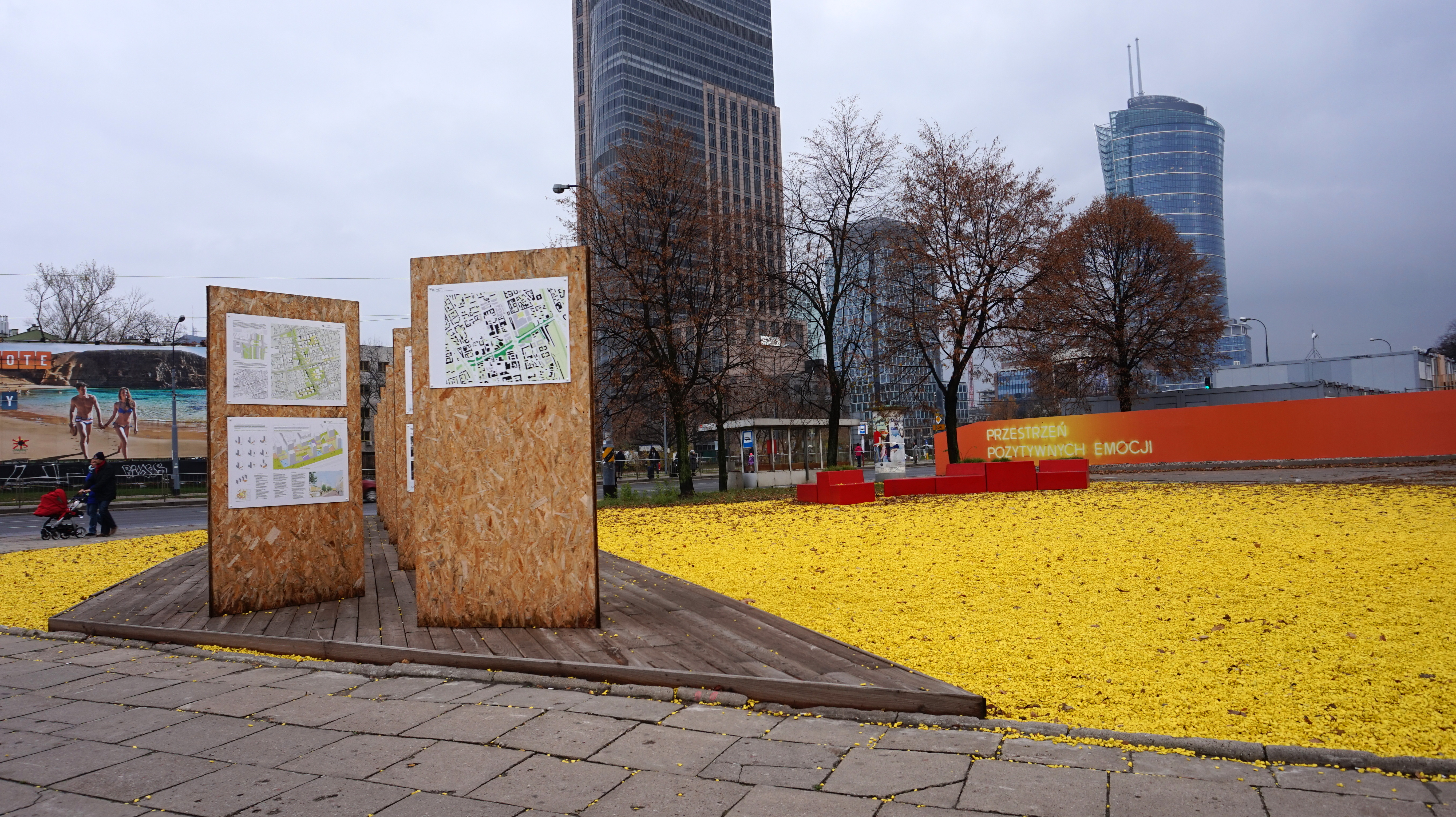 Plac przed budowanym kompleksem Spark